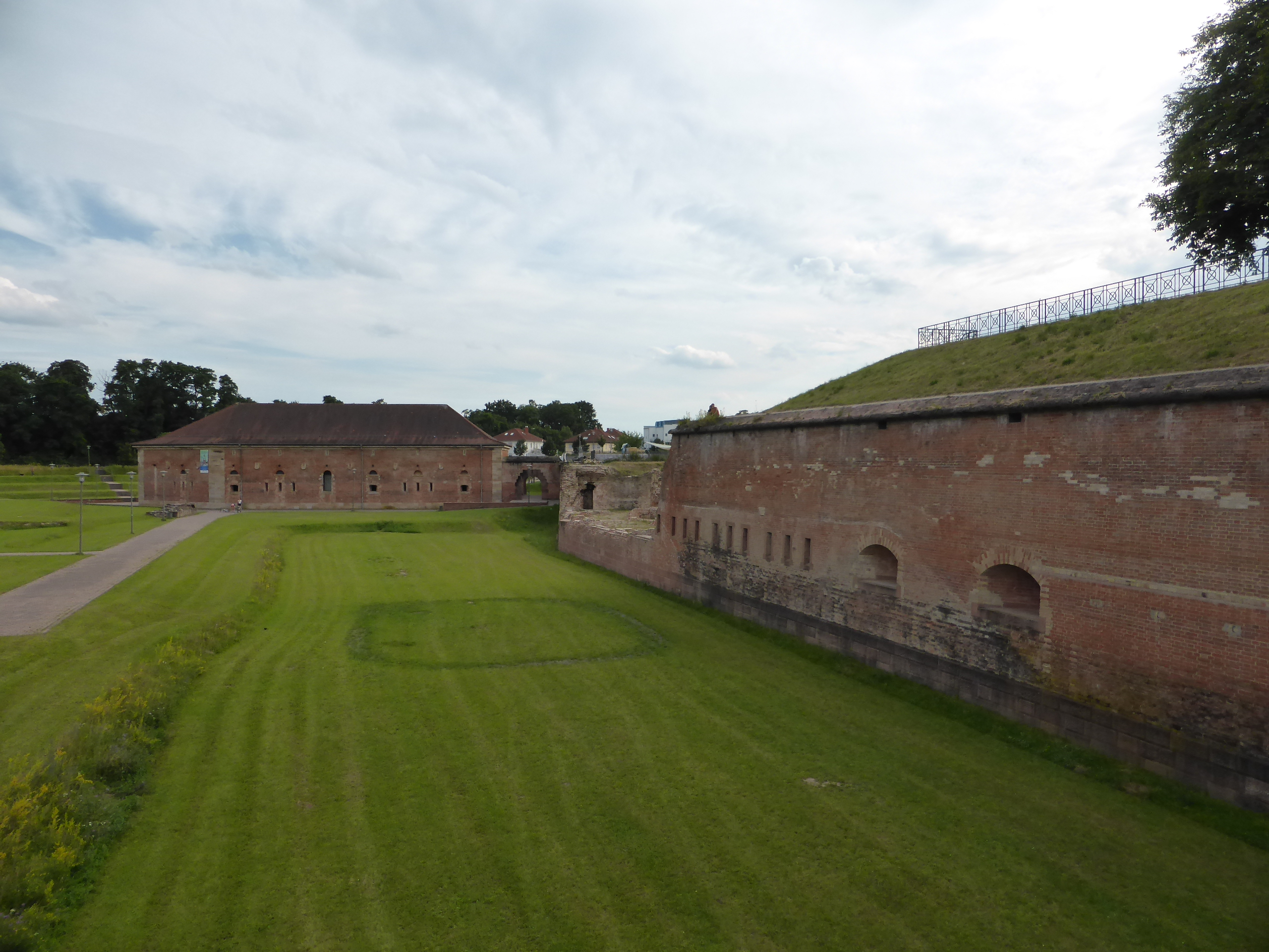 Weißenburger Tor in Germersheim